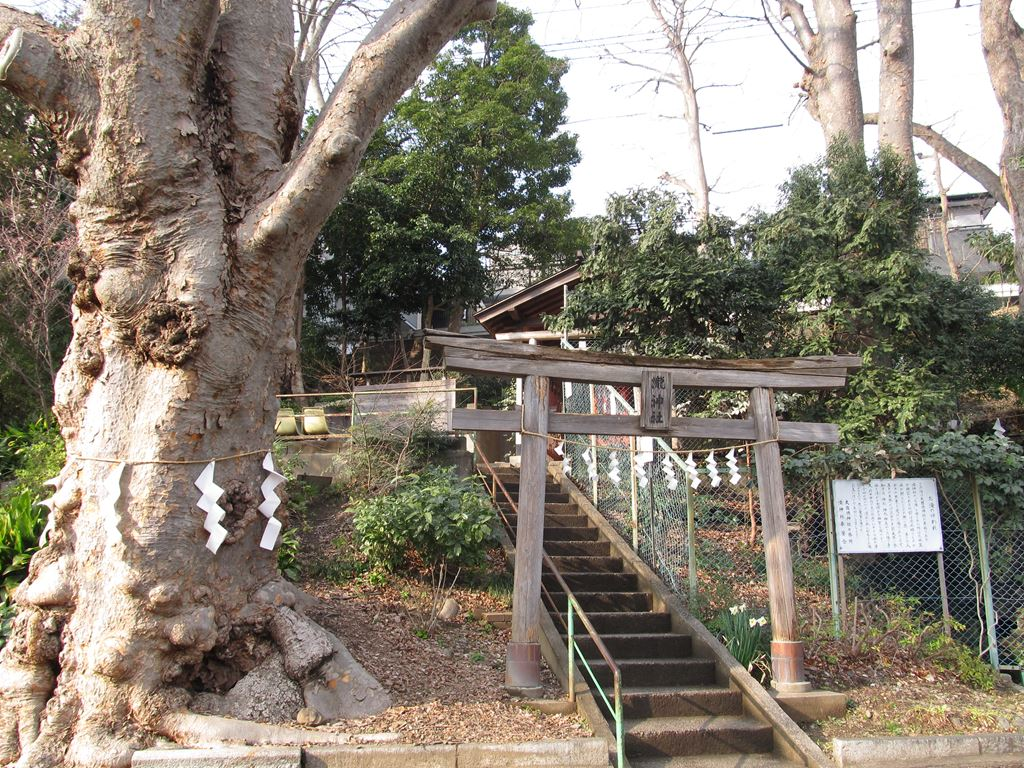 瀧神社（東京都府中市）